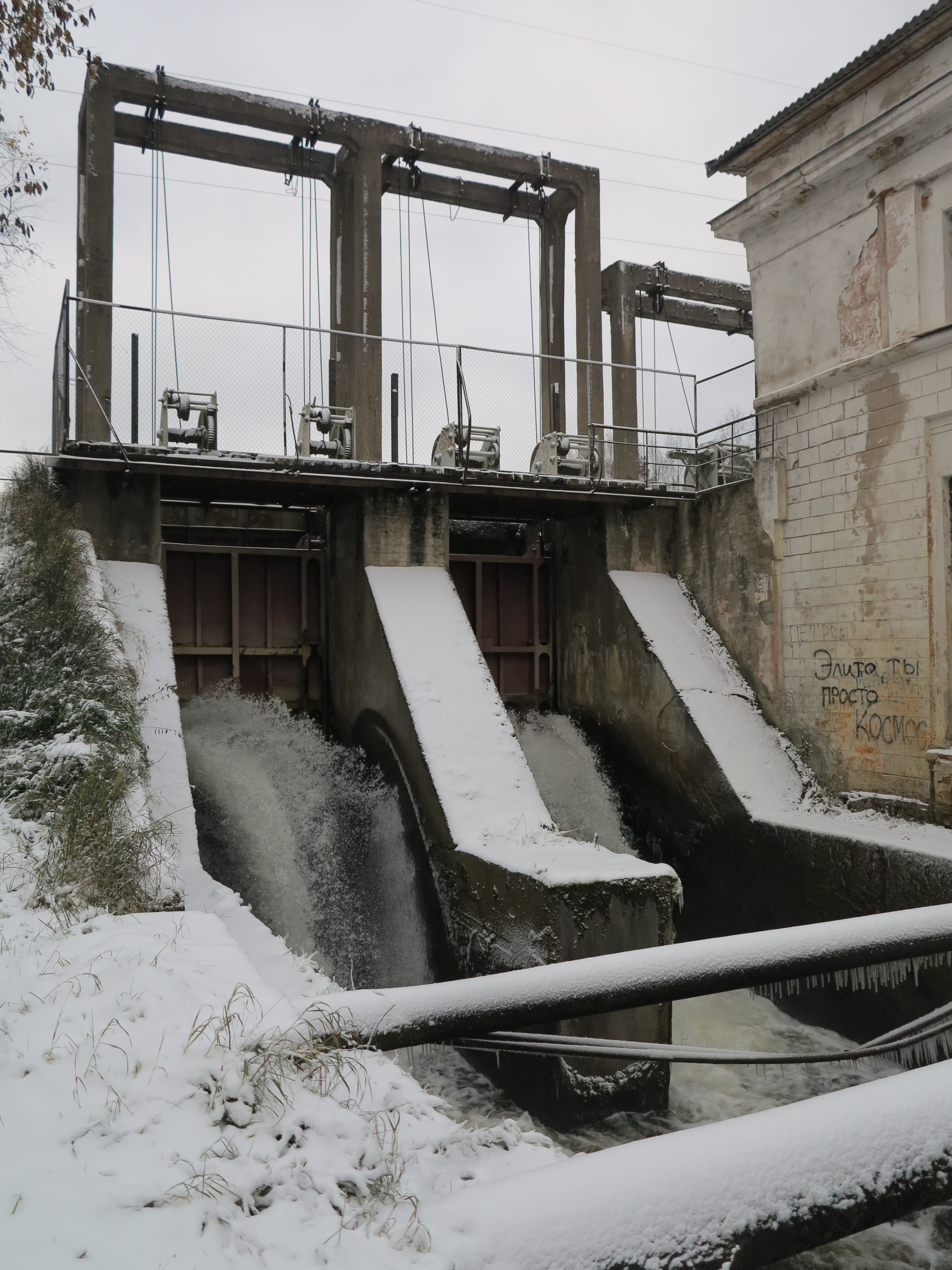 Гидроэлектростанция Лужская-1 на реке Быстрица, Ленинградская область